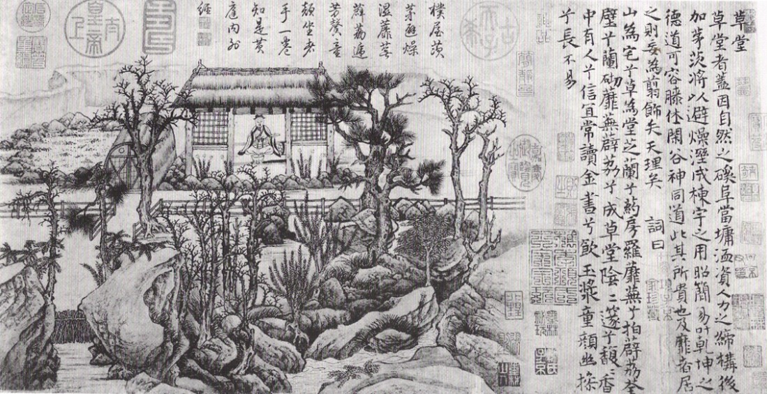 Vue I des Dix vues d'un pavillon à toit de chaume, par le peintre chinois Lu Hong durant le huitième siècle, rouleau portatif, encre sur papier. Ces dix vues résident au Musée national du palais impérial de Taipei.